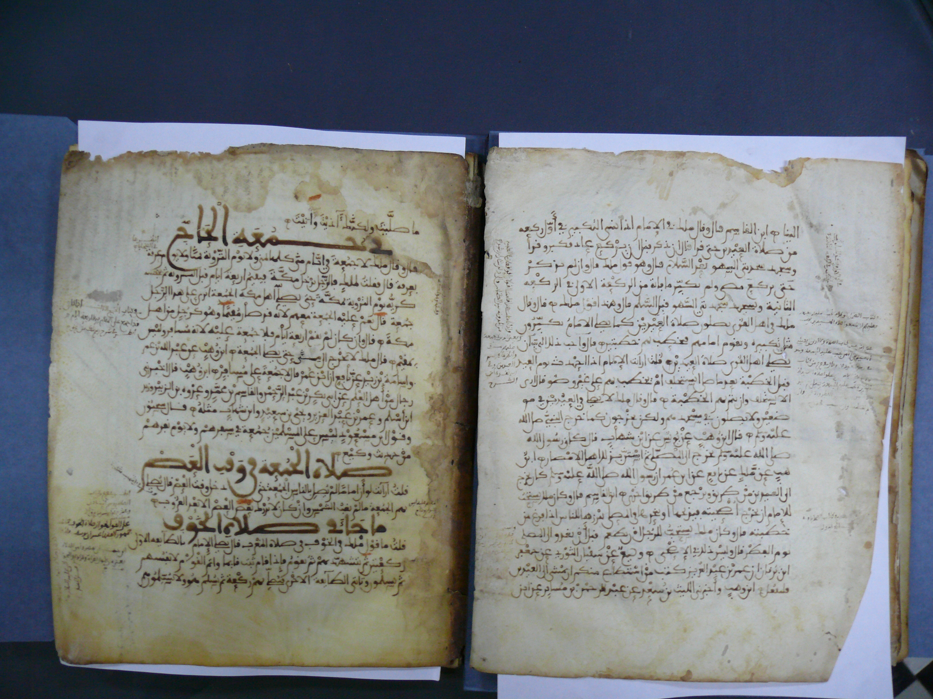 Doppelblatt, Handschrift, Pergament. 11. Jahrhundert